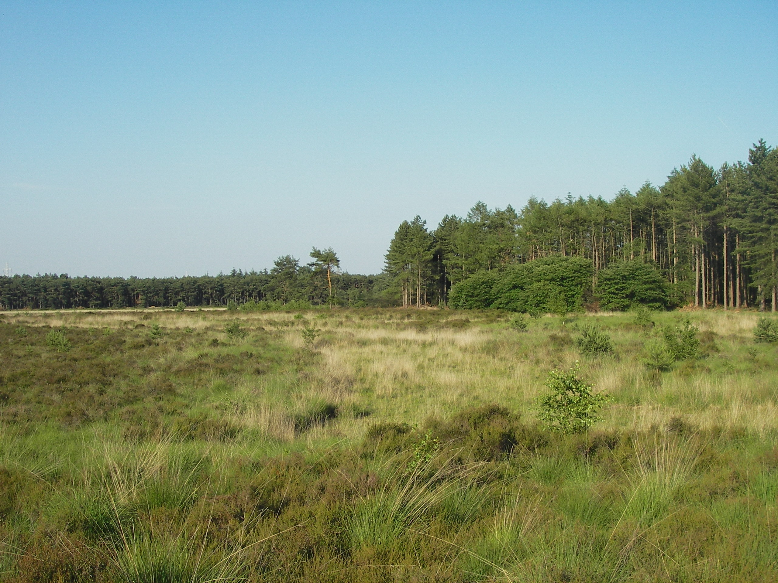 De Groote heide tussen Geldrop, Heeze en Aalst